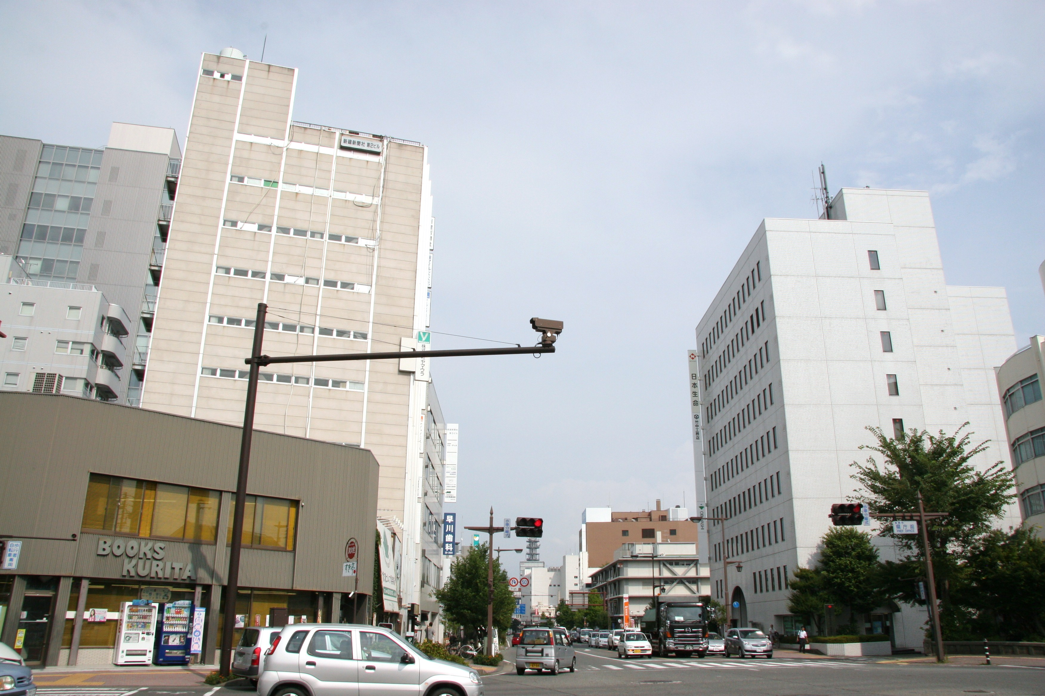 長野昭和通り